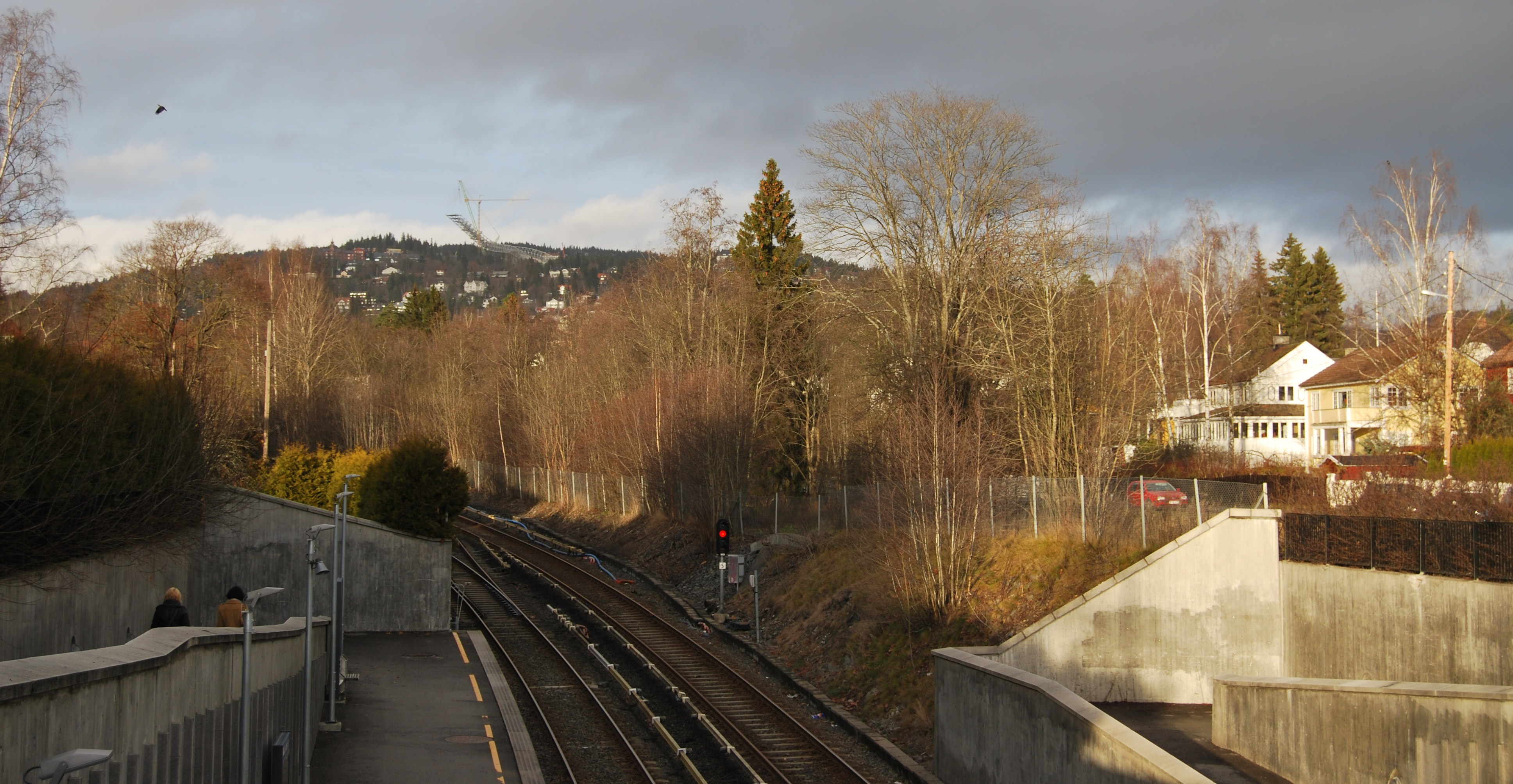 Makrellbekken stasjon; widok na Holmenkollen, Oslo (2009 rok).